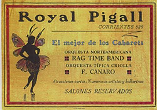 Tarjeta del cabaré Royal Pigall, de Buenos Aires